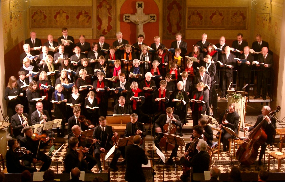 Die Biederitzer Kantorei und das Weimarer Barockensemble führten Händels "The Messiah" in der Pauluskirche Magdeburg auf.